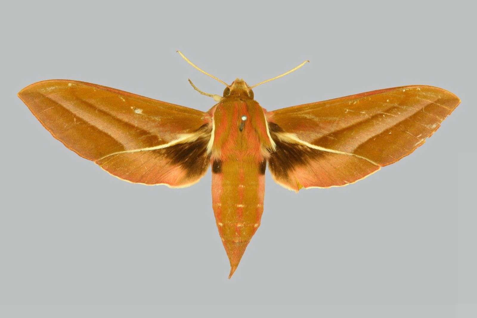 Deilephila rivularis, female, upperside. India, Punjab, Simla